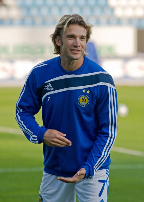 Перший матч після повернення